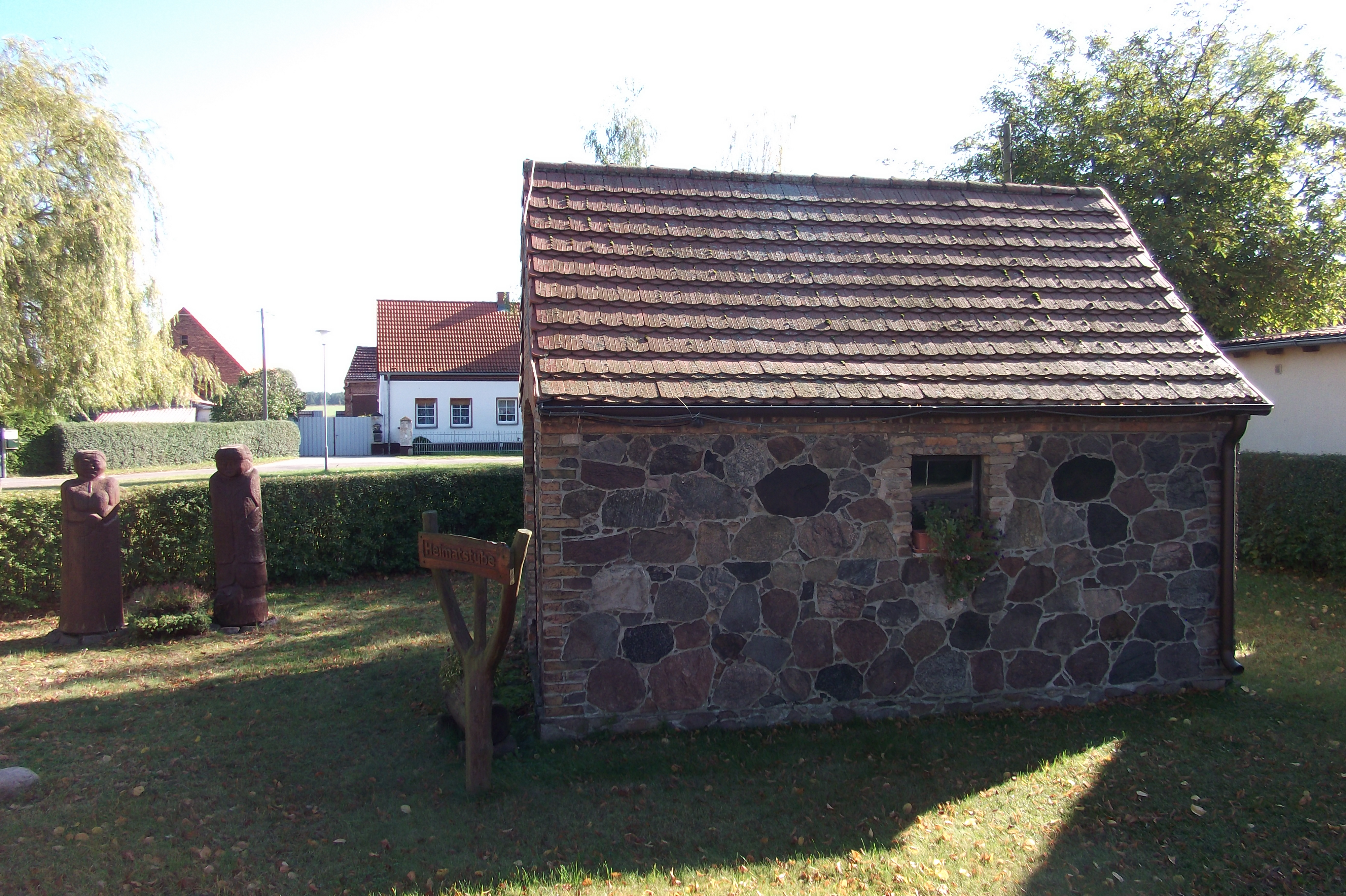 Heimatstube (ehem. Feuerwehrhaus) auf dem Dorfplatz in Gadsdorf, Gem. Am Mellensee, Brandenburg, Deutschland